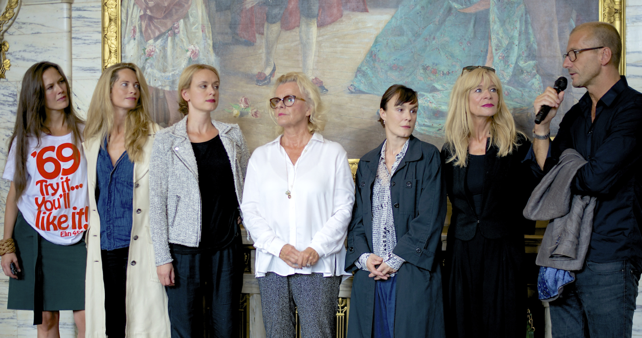 Markisinnan de Sade-ensemblen under Dramatens höstsamling 2014. Från vänster: Elin Klinga, Maria Bonnevie, Livia Millhagen, Marie Göranzon, Rebecka Hemse, Mia Benson och regissören Stefan Larsson.